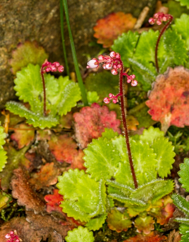 Arktisch-alpiner Garten Chemnitz: Rauhaar-Steinbrech